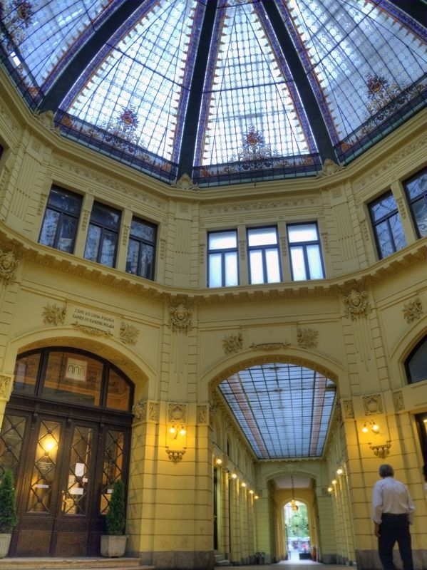 Zagreb